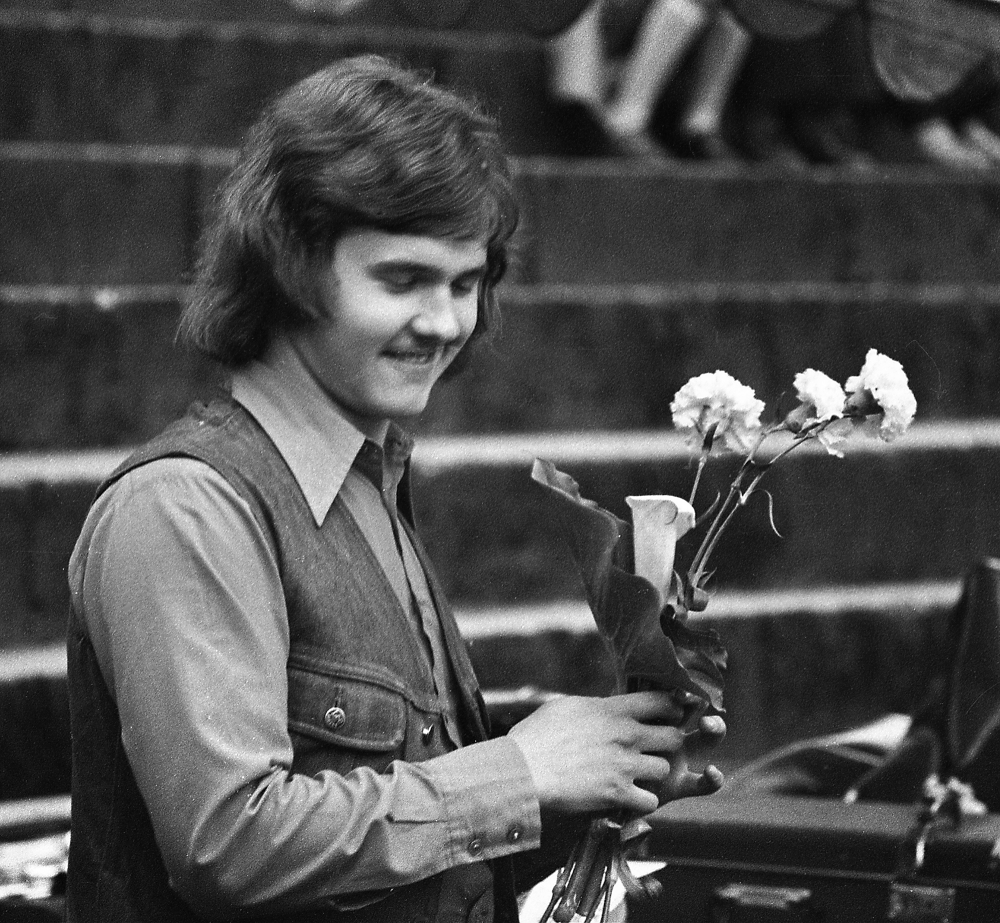 Priit Pihlap, Palderjan (ansambel) 1978